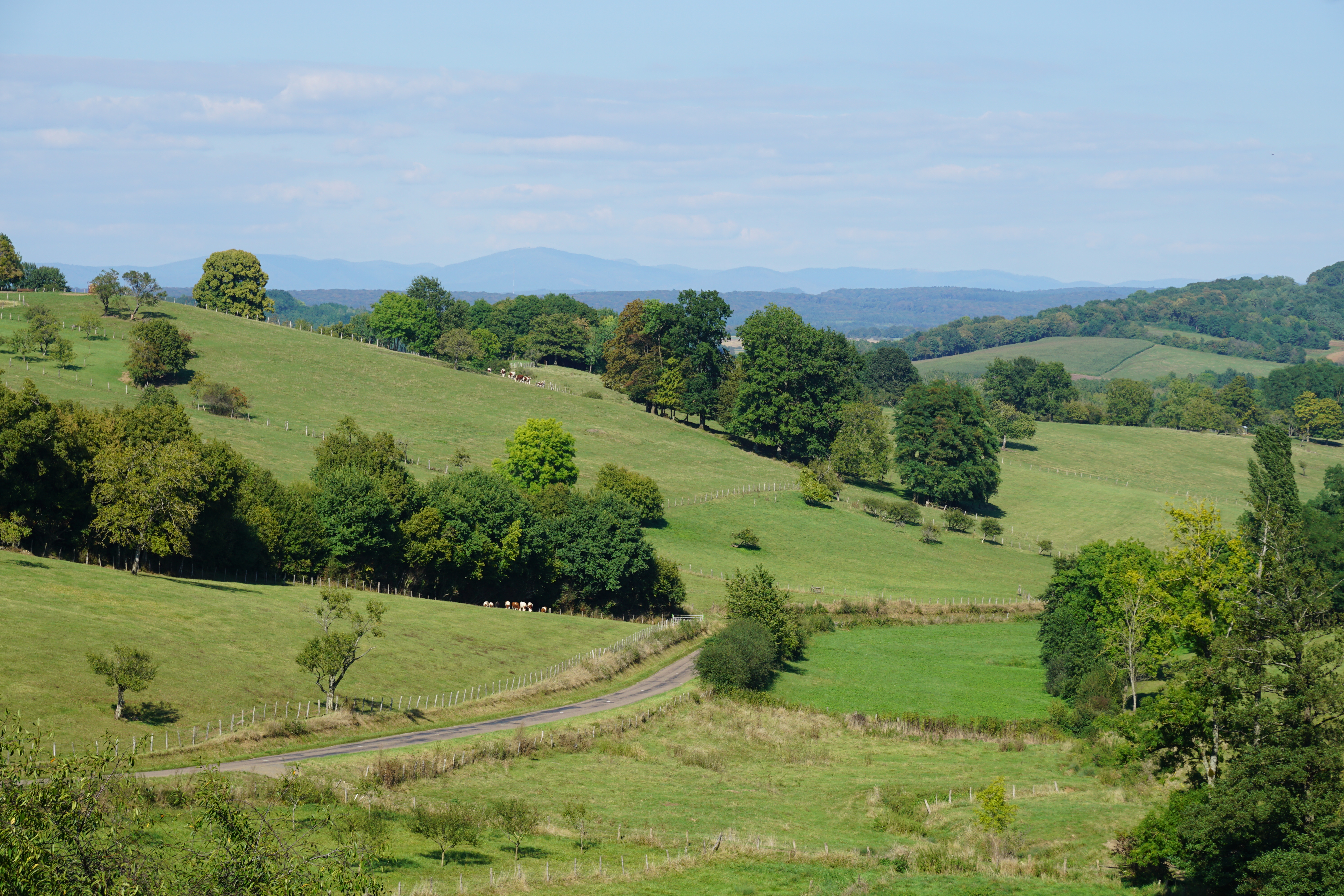 Paysage des Vosges depuis Grammont (Haute-Saône).